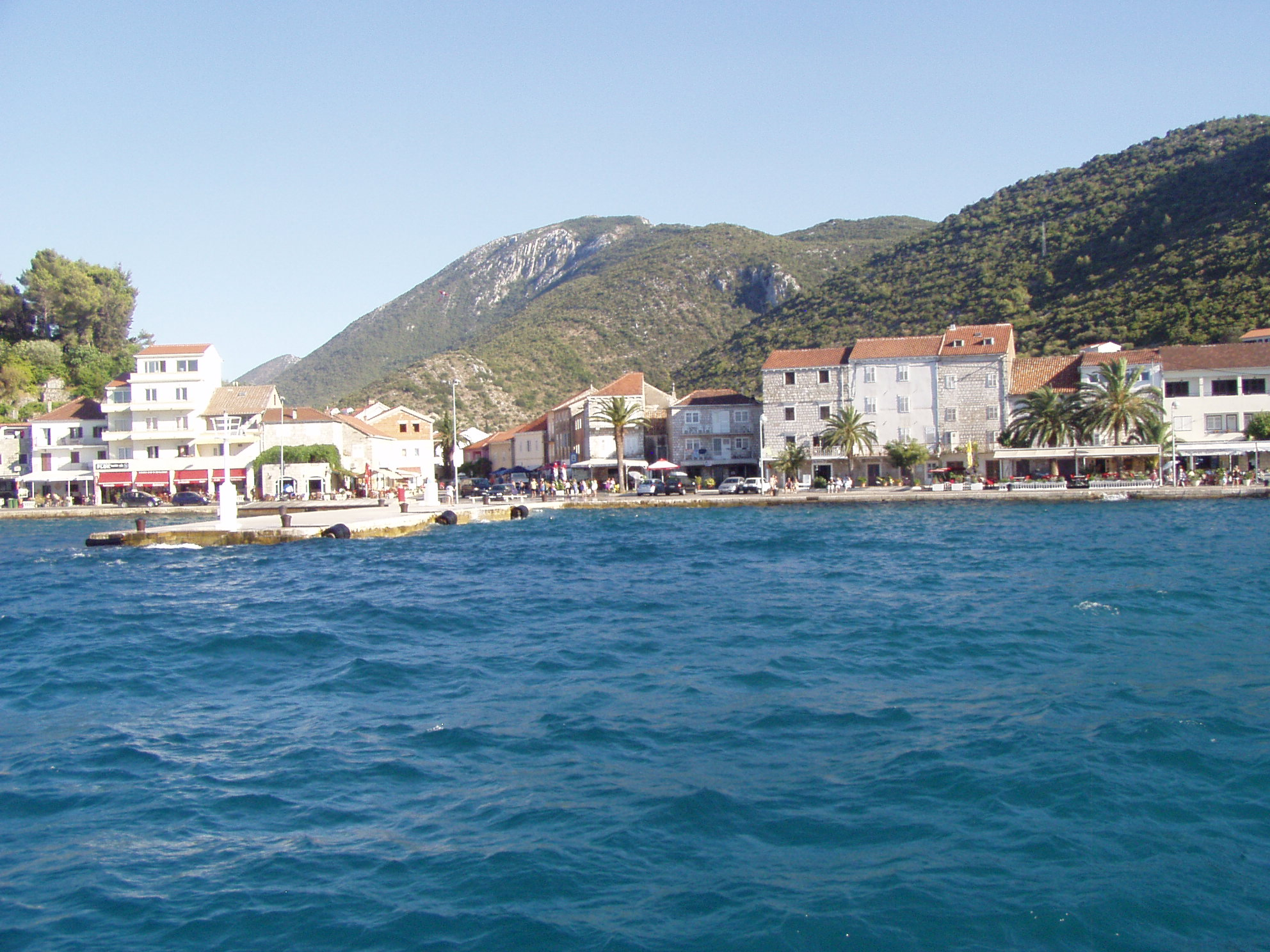 Trpanj